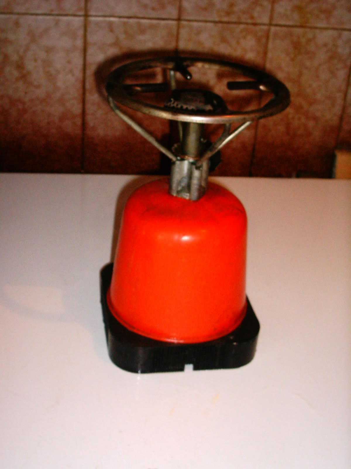 Плински решо. Драган Цветковић Ниш